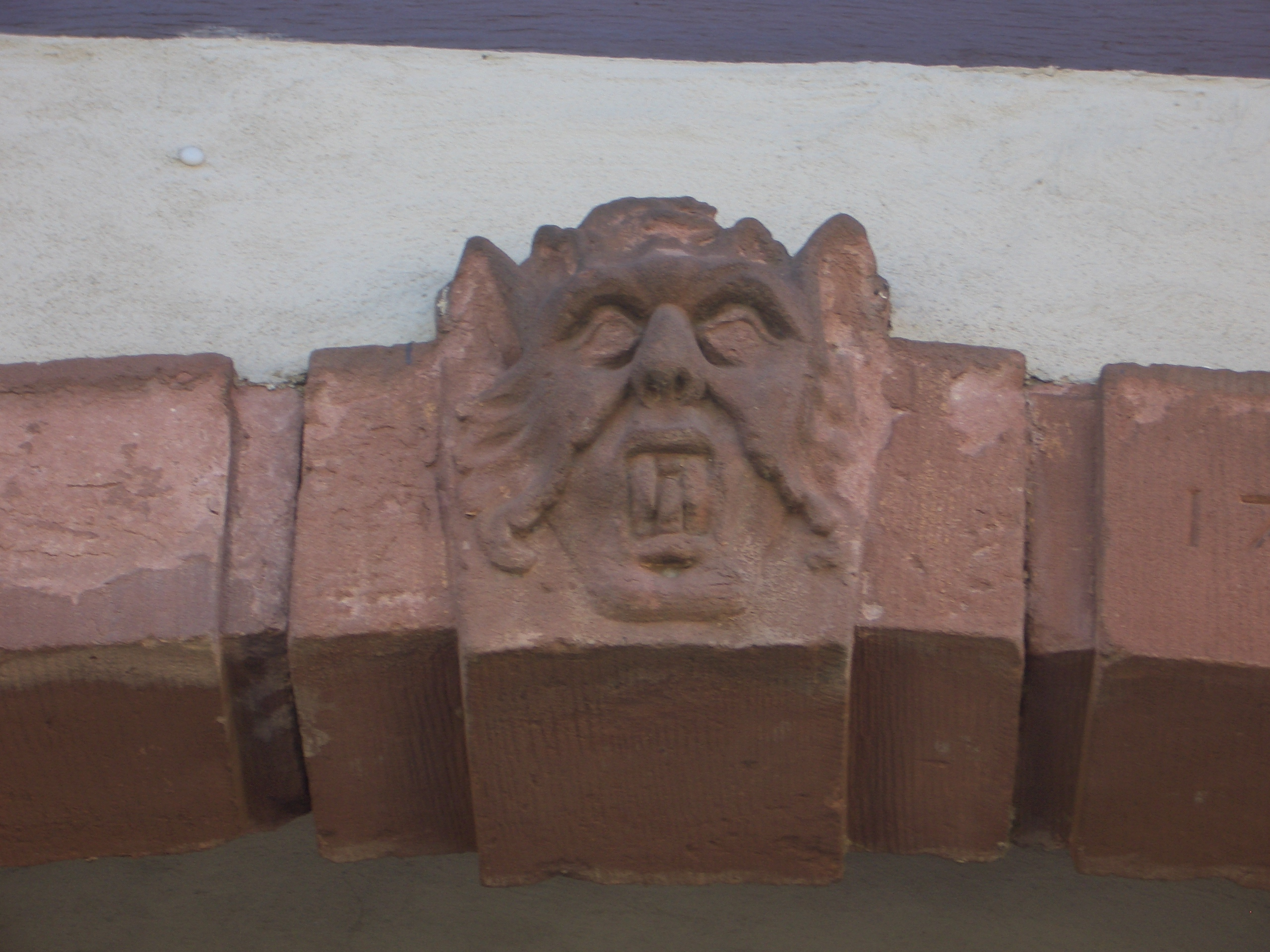 Breilecker am östlichen Torbogen des Rathauses Lengfeld